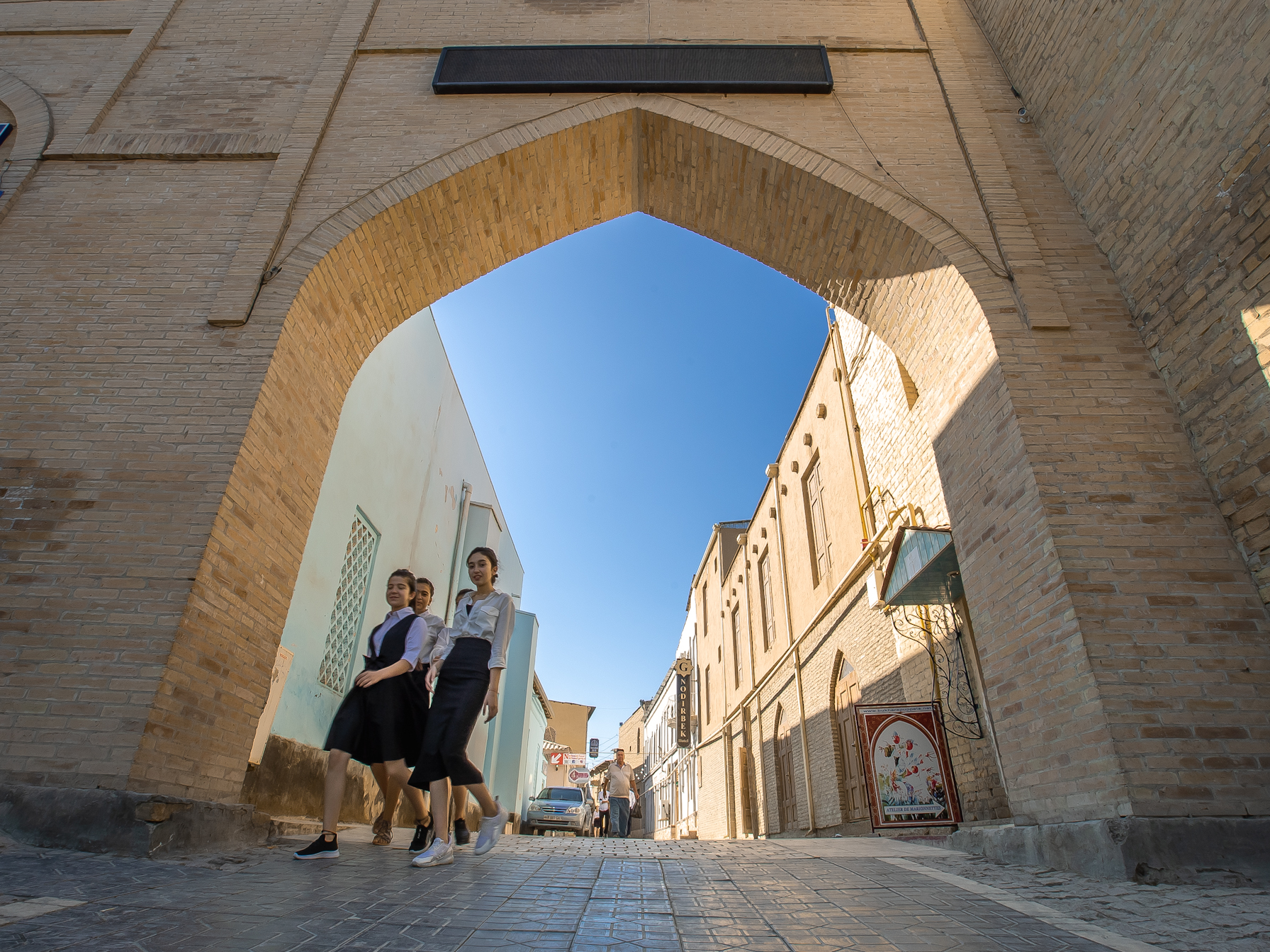 این عکس توسط پوریا افخمی در حاشیه ضبط برنامه تلویزیونی بلور بنفش به کارگردانی بهزاد بلور در شهر بخارا ثبت شده است.